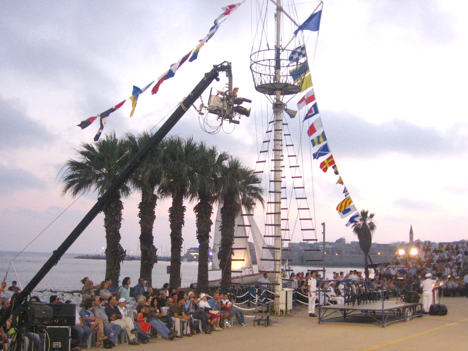 טקס סיום מחזור נ"ב שימש כדף שער לפרסומי עמותת הבוגרים יוני 2006